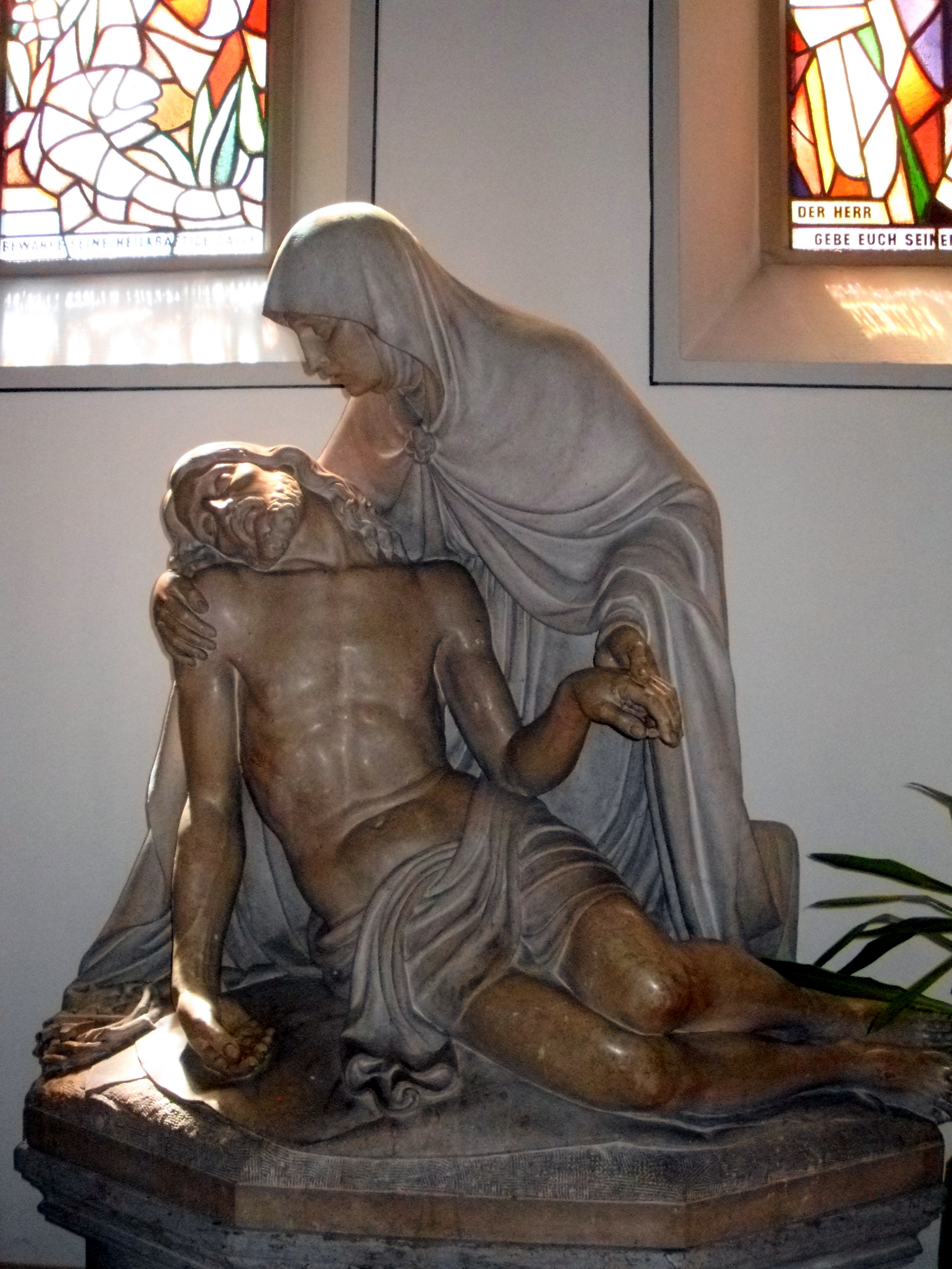 St. Raphael ist eine katholische Kirche im Heidelberger Stadtteil Neuenheim. Sie wurde in den Jahren 1903 bis 1905 im neuromanischen Stil errichtet und ist dem Erzengel Raphael geweiht.